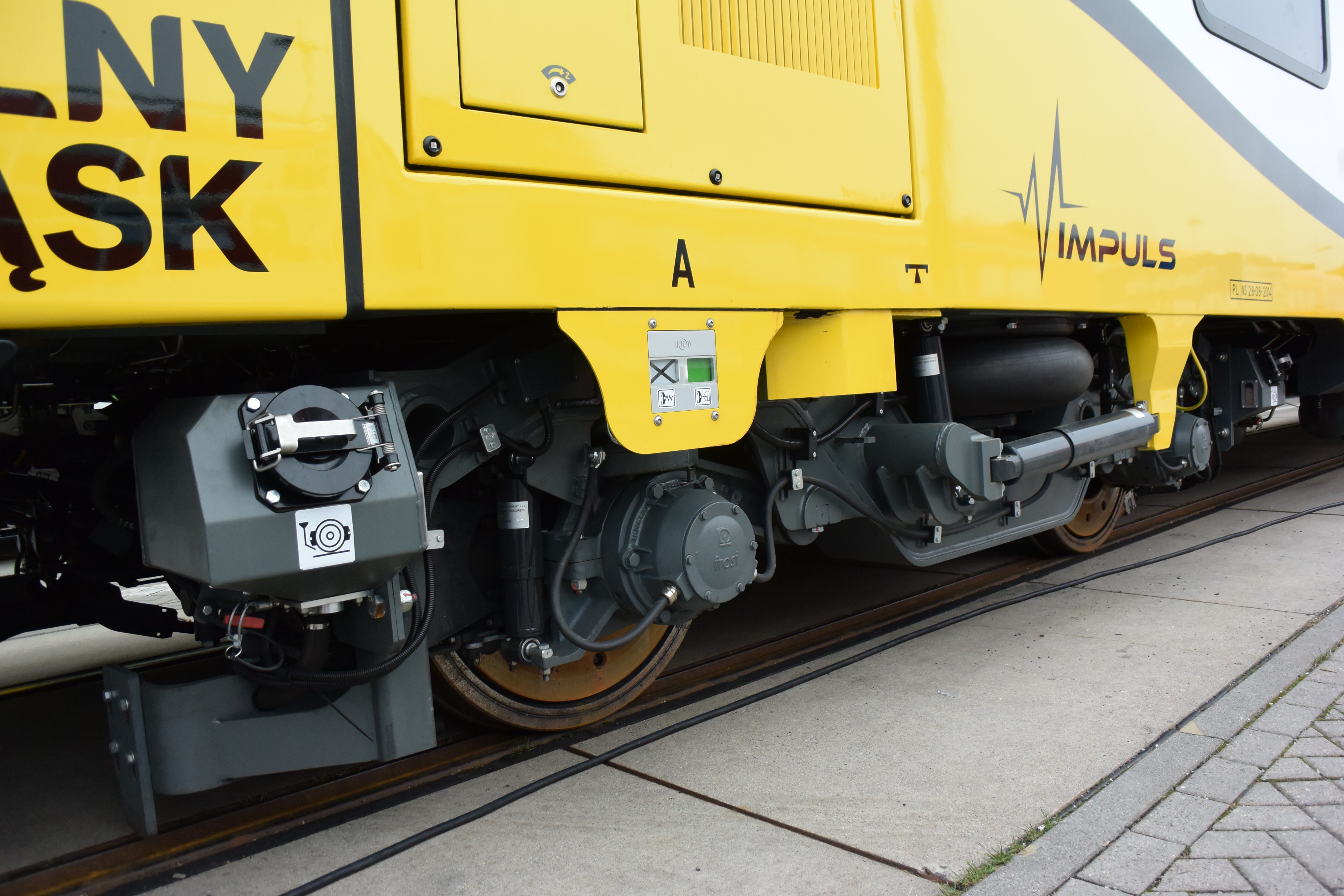 Newag Impuls podczas InnoTrans 2014